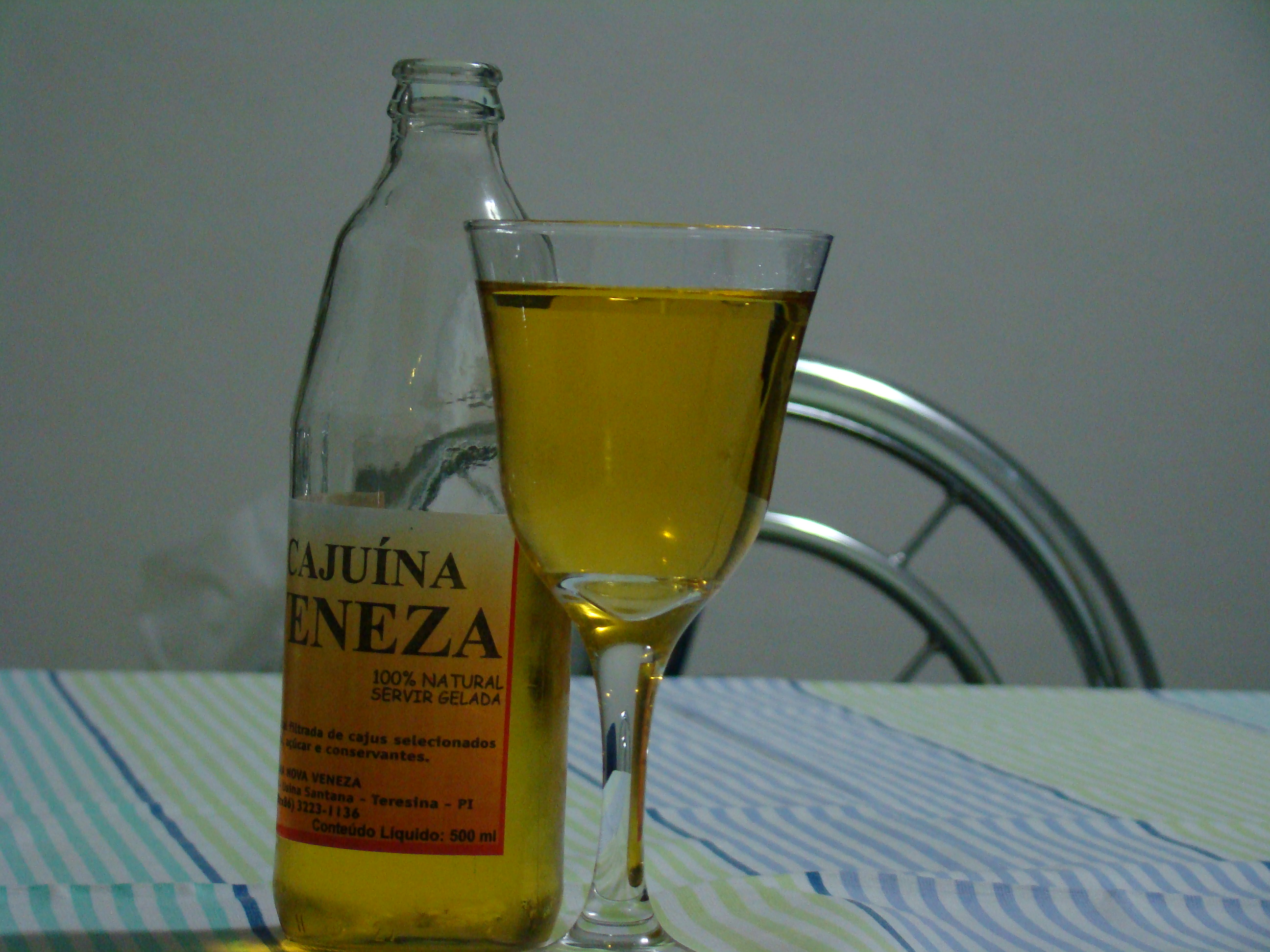 Cajuína.